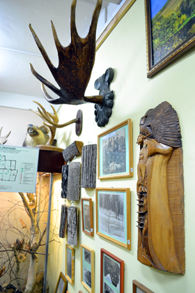 Зал природы Одоевского краеведческого музея